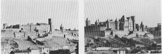 La Cité de Carcassonne avant et après les travaux de restauration de Viollet-le-Duc